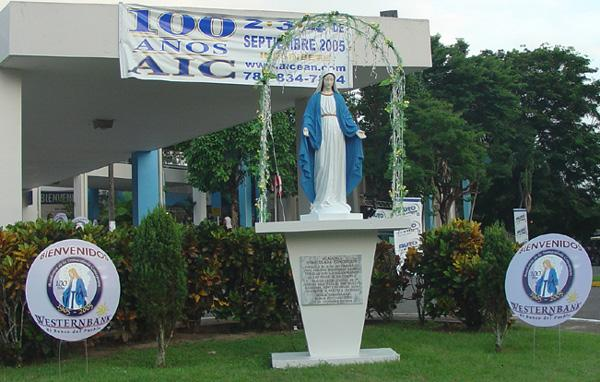 Entrada del edificio de la Escuela Superior de la Academia de la Inmaculada Concepción. Actividades del Centenario.